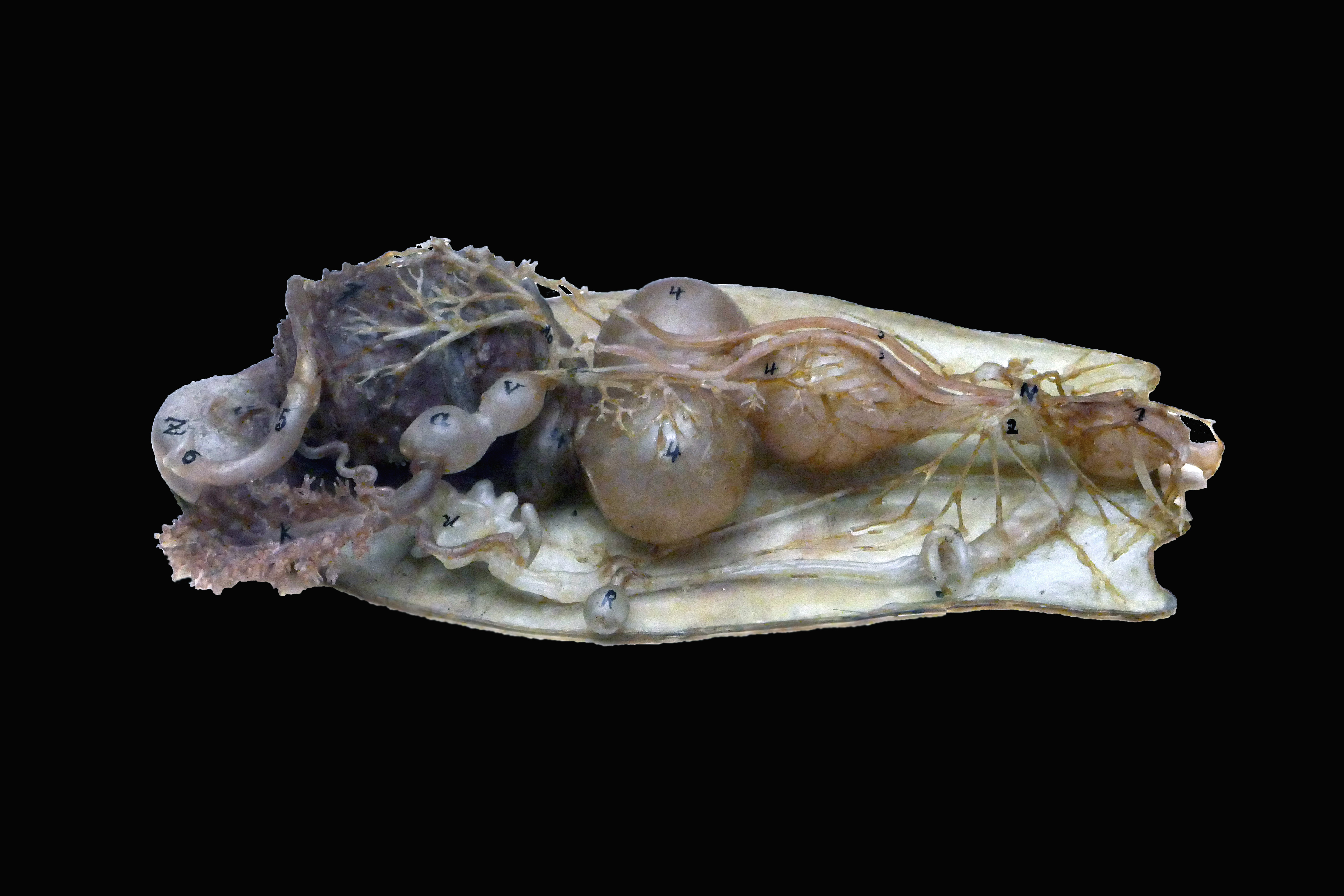 Anatomie de lièvre de mer commun (Aplysia depilans). Modèle en verre peint de Leopold et Rudolf Blaschka. 1890. Musée zoologique de Strasbourg.